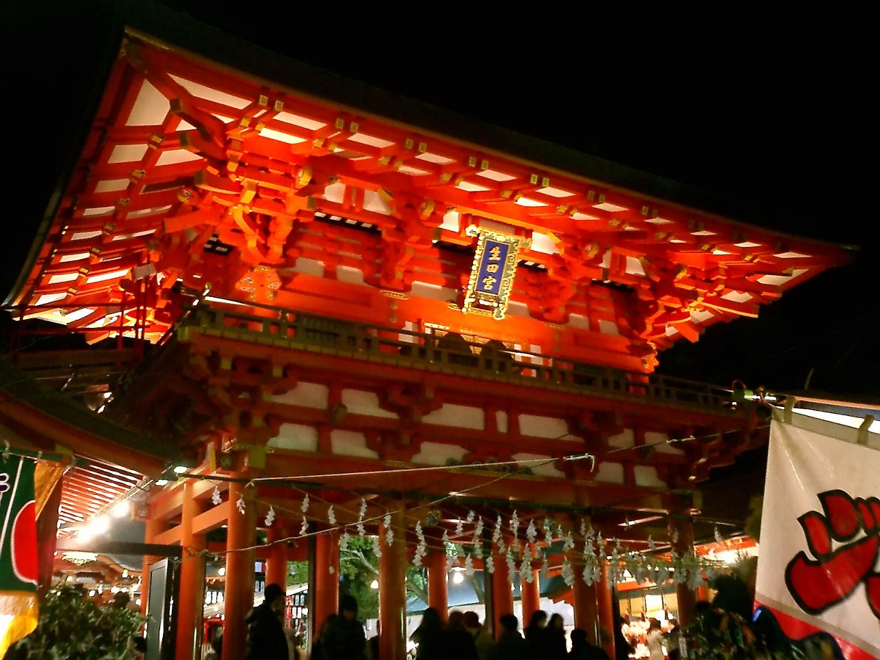 Ikuta_Jinja_Romon